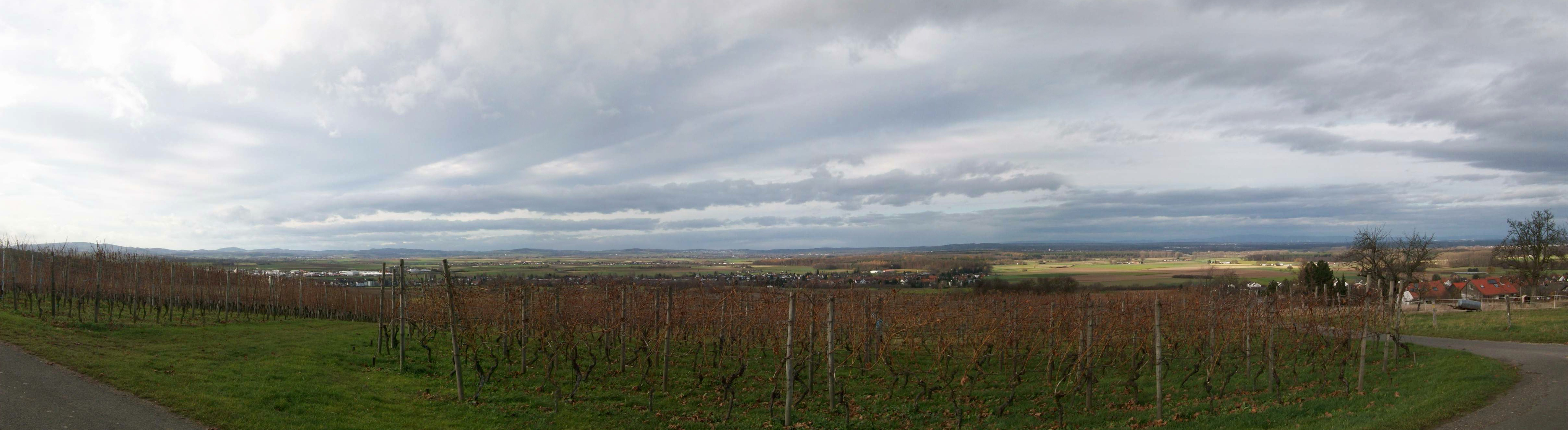 Blick vom Standort Wendelinuskapelle Klein-Umstadt, den letzten Ausläufern des nördlichen Odenwaldes (Naturraum Kleine Bergstraße (231.3) nach Westen in den Odenwald (links im Hintergrund Neunkircher Höhe), daneben der kleine markante Buckel des Felsberges und daneben der schmale Absatz des Melibokus) mit schwacher Horizont Sicht zum Hunsrück, weiter über die Reinheimer Berge (Schloßberg) in die Dieburger Bucht (Naturraum 232.230) im Vordergrund und das dahinterliegende Messeler Hügelland (Naturraum 230) (Bildmitte: Mainzer Berg) bis am halbrechten Bildrand der Taunus (mit dem Großen Feldberg) auftaucht, der sich hinter der Skyline von Frankfurt aufbaut